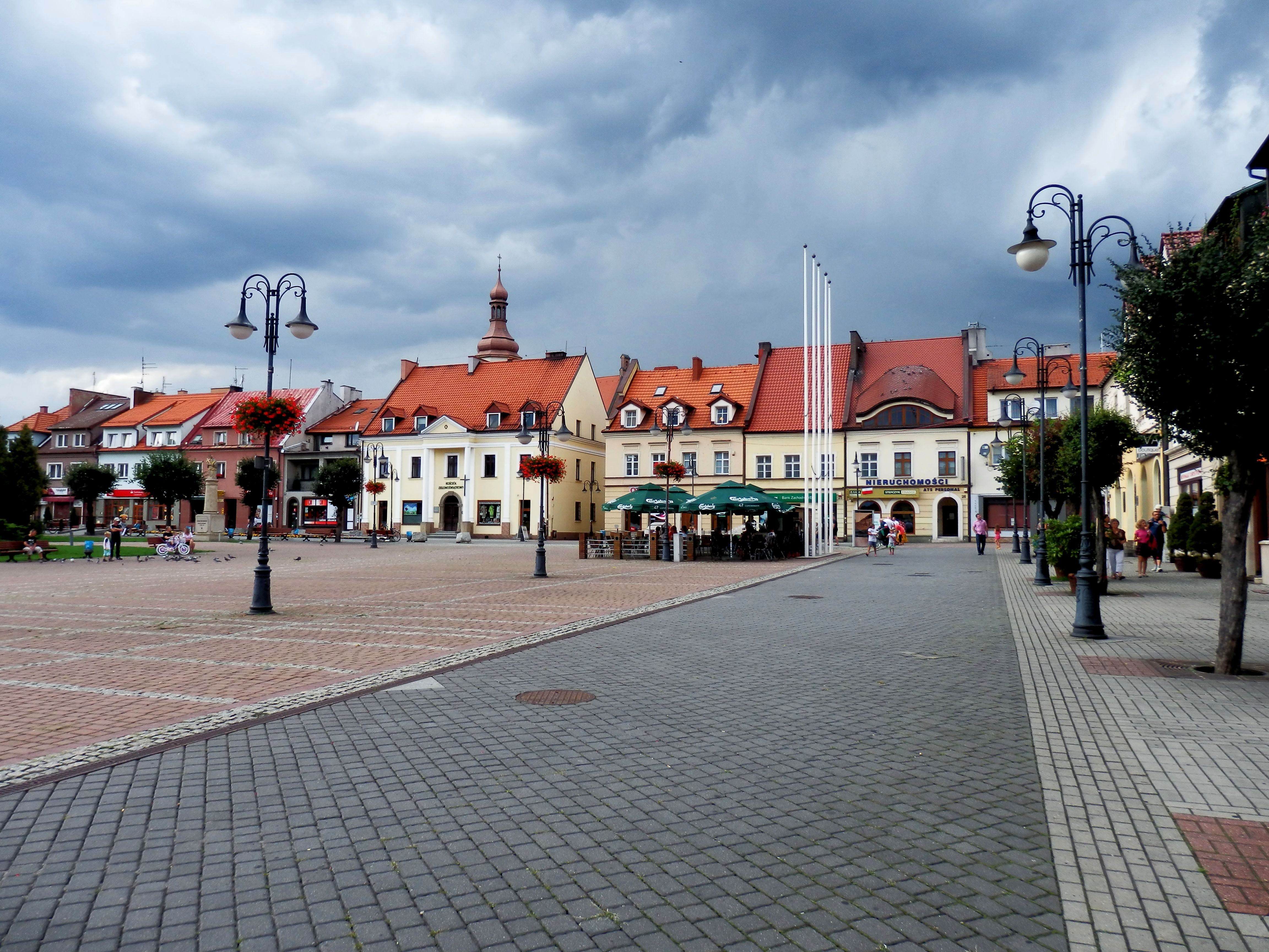 Żory, układ urbanistyczny